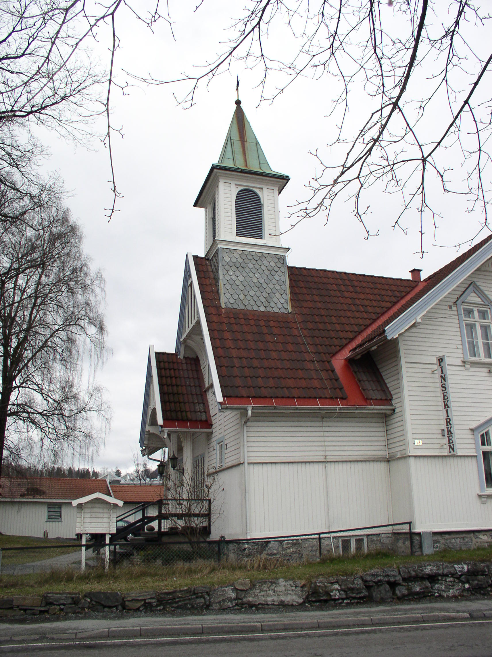 Pinsekirken i Bærum